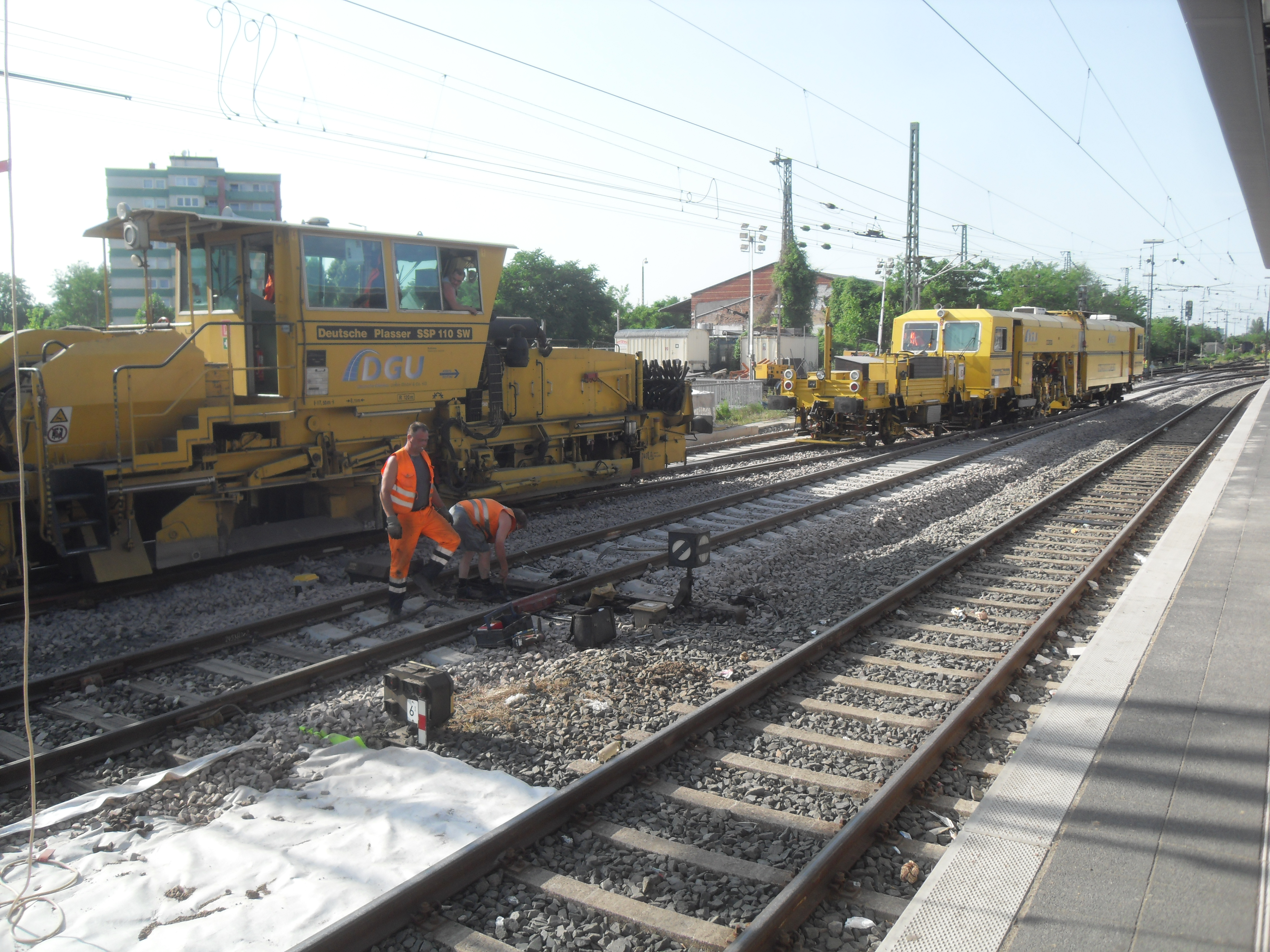 Bauarbeiten im Wormser Hauptbahnhof, unter anderem mit der Maschine „SSP 110 SW“ von Plasser & Theurer